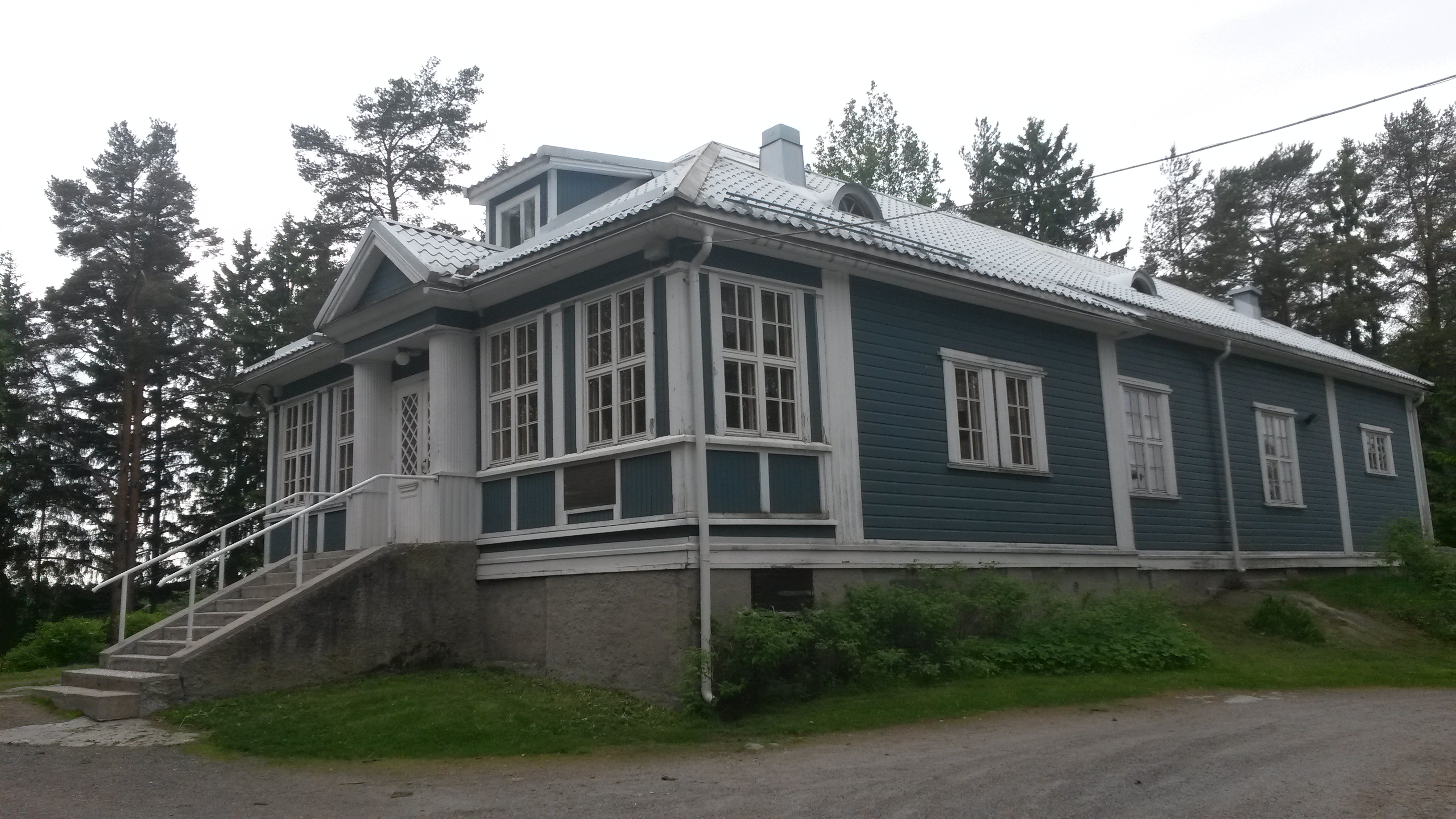 Pirtti